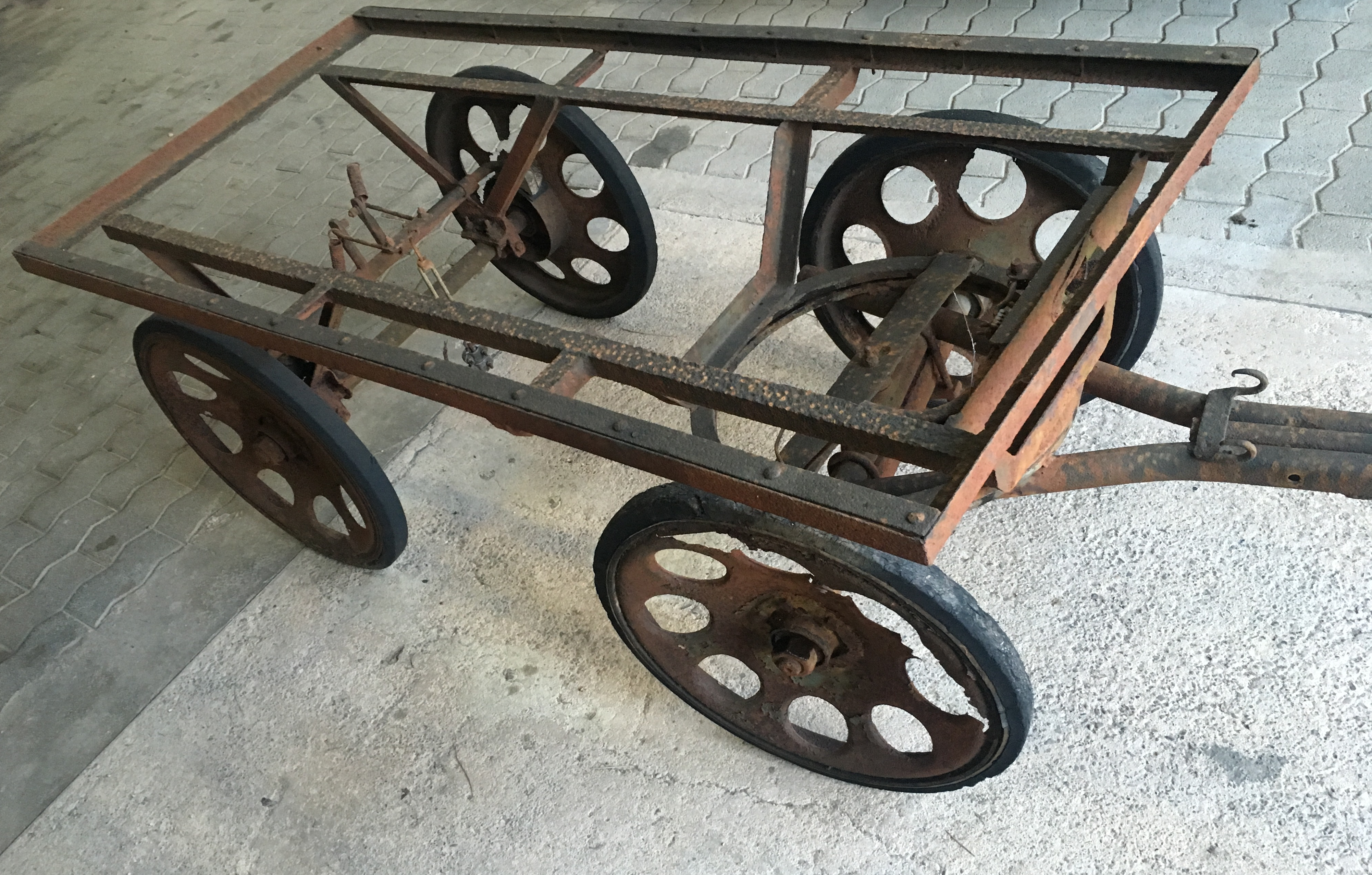 Horch Aufbauwagen 1945, 2-achsige Ausführung mit Drehschemel